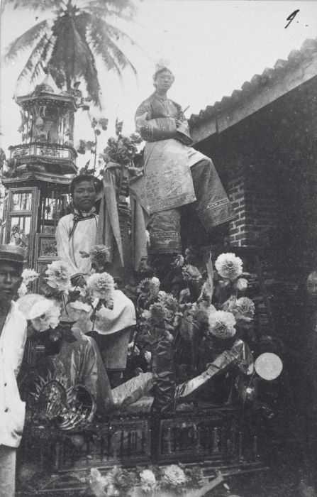 foto. Chinezen in een optocht tijdens een tentoonstelling in Medan